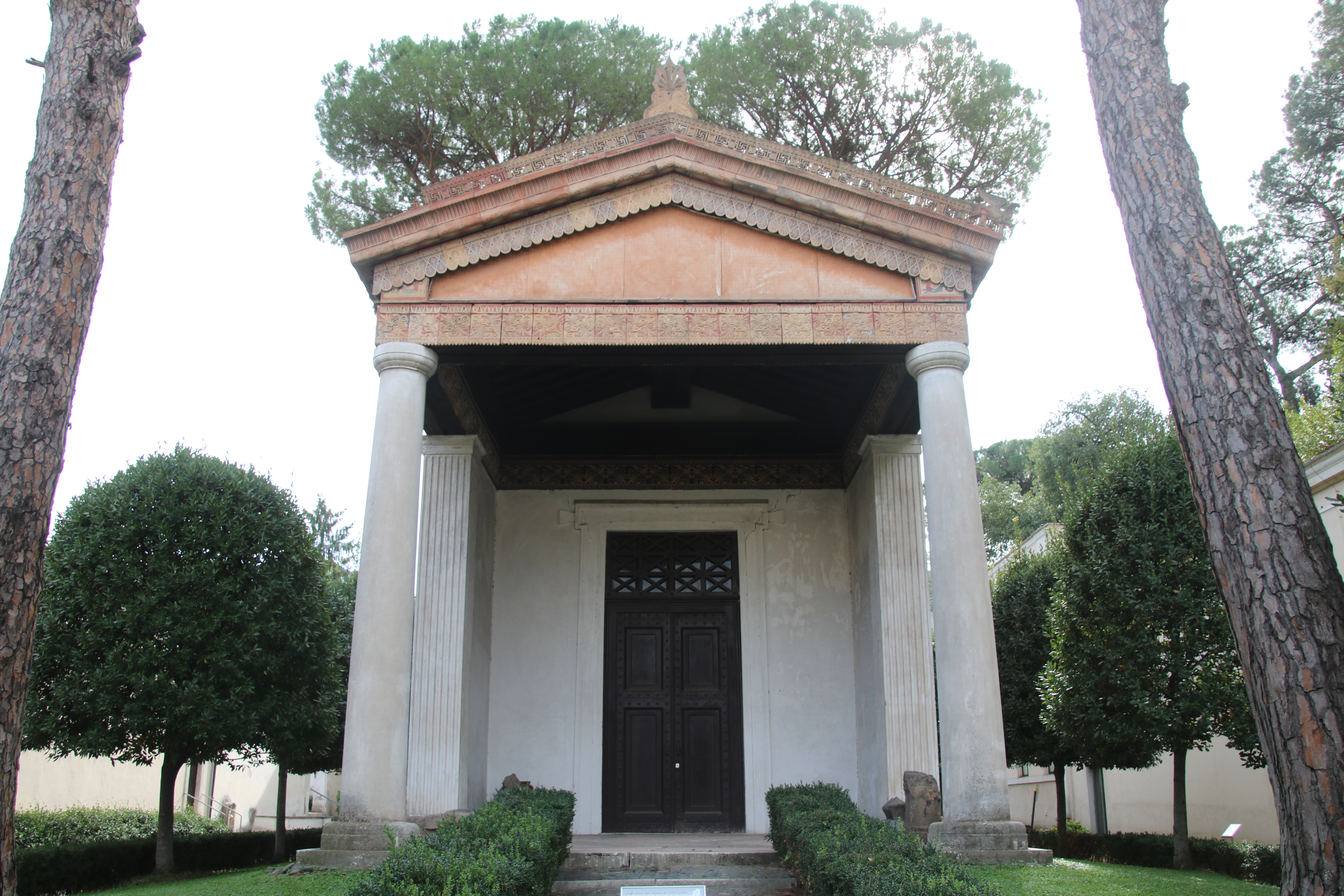 Ricostruzione del tempio di alatri This is a photo of a monument which is part of cultural heritage of Italy.